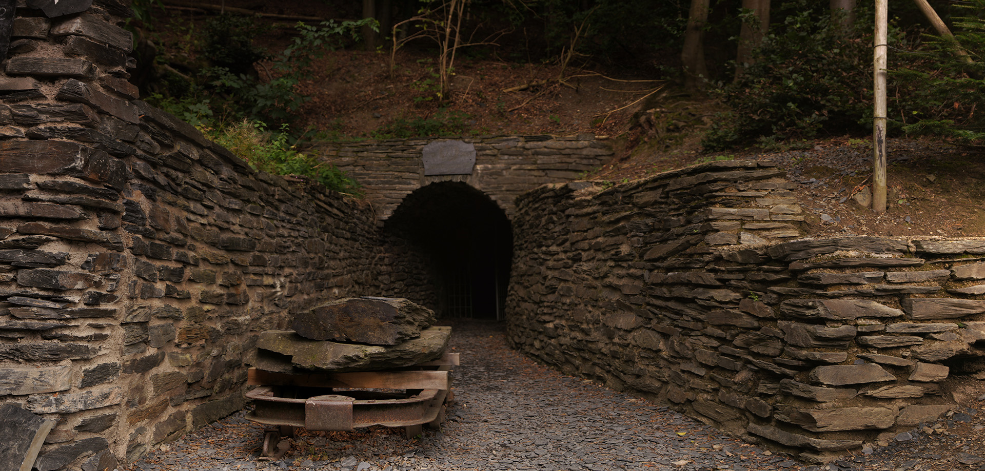 Eingang des Besucherbergwerkes Fell - Grube Hoffnung